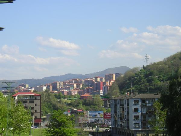 Basauri Bilbotik ikusia.